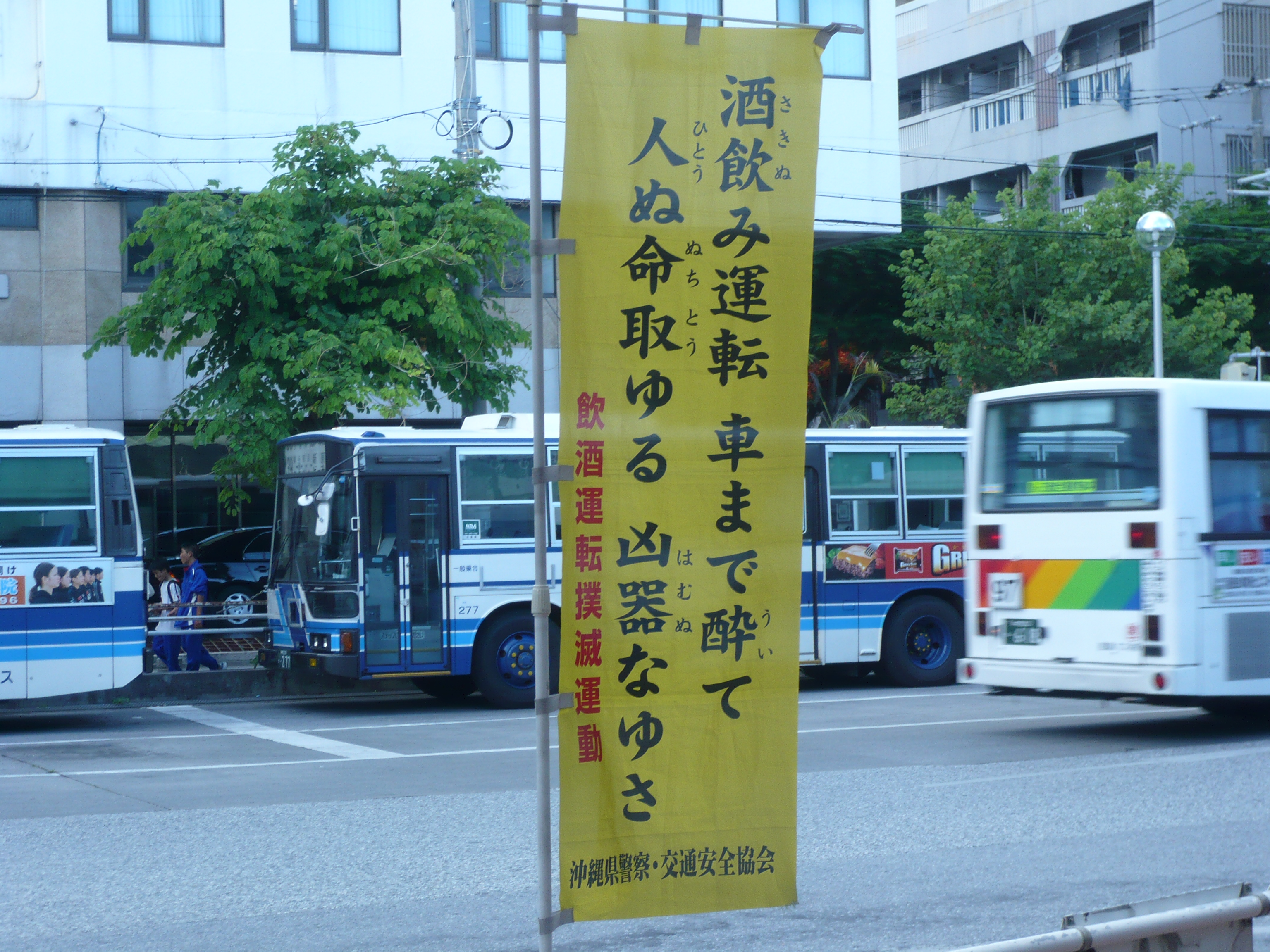 琉球語で書かれた沖縄県警察ののぼり